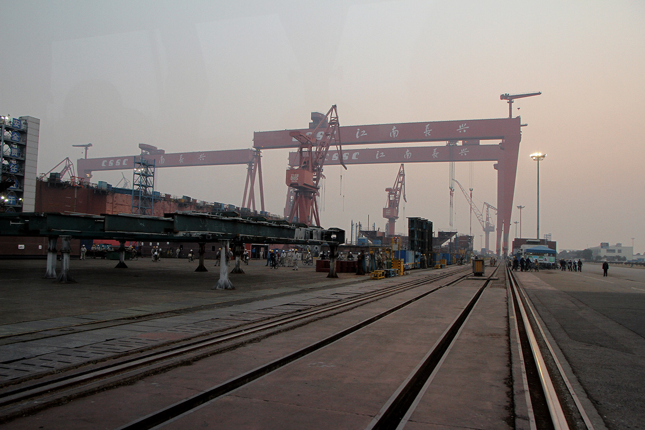 Shangai/China, 9 de ene (ANDES).- Presidente correa visita el 2do astillero mas grande del mundo, BSSC, junto a comitiva ecuatoriana conformada por ministros de estado y el mandatario. Fotografías: Carlos Rodríguez/ANDES